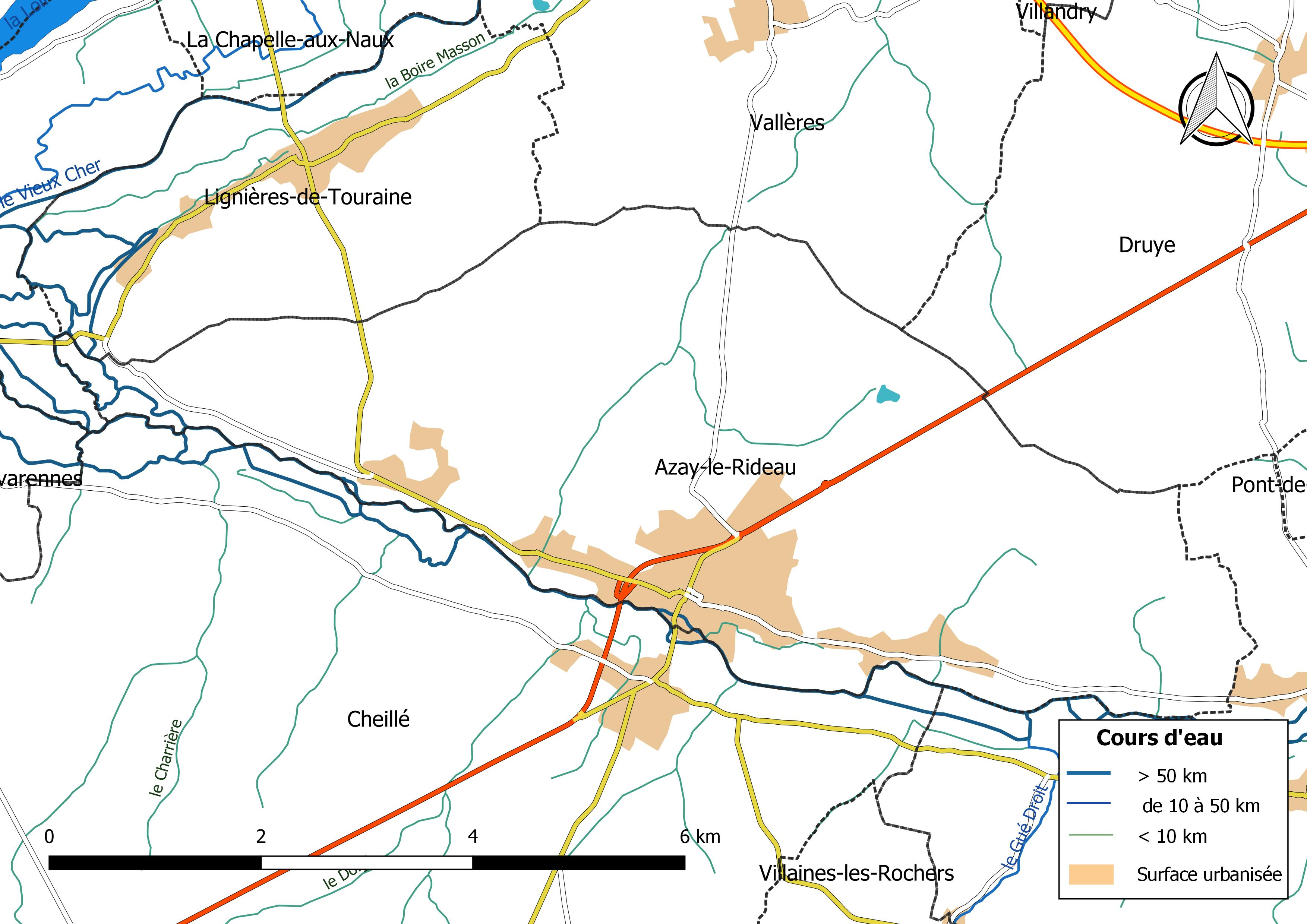 Carte du réseau hydrographique de la commune de Azay-le-Rideau (France).